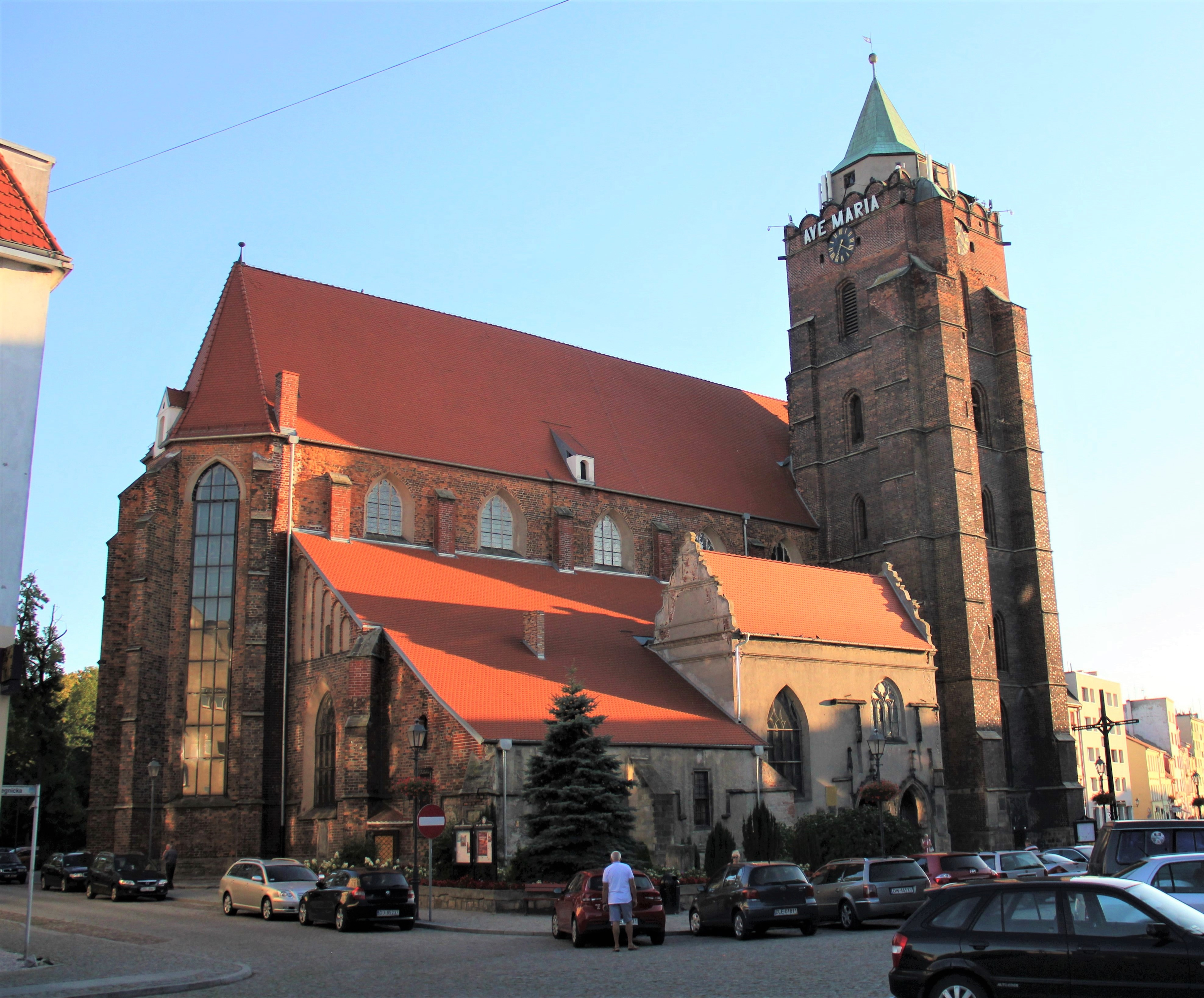 Kościół Świętych Apostołów Piotra i Pawła w Chojnowie. Widok na północną i wschodnią fasadę ze skrzyżowania Rynku z ulicą Legnicką i Artura Grottgera.